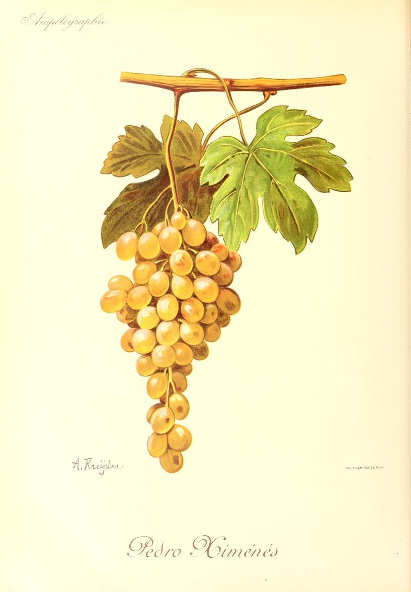 Illustration du cépage Pedro Ximénès par Alexis Kreyder dans l'ouvrage "Ampélographie : traité général de viticulture" publié sous la direction de P. Viala & V. Vermorel avec la collaboration de A. Bacon, A. Barbier, A. Berget [et al.] - Date de l'édition originale : 1901-1910